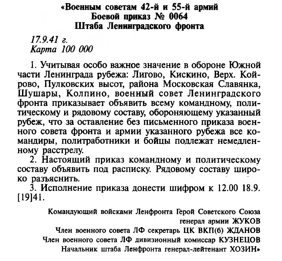 Боевой приказ № 0064 от 17.09.1941 г. (скан) воспроизведено и приводится по изданию: Краснов В. Г. "Жуков. Маршал Великой империи. Лавры и тернии полководца" -М.: ОЛМА-ПРЕСС 2005. ISBN 5-224-04783-8